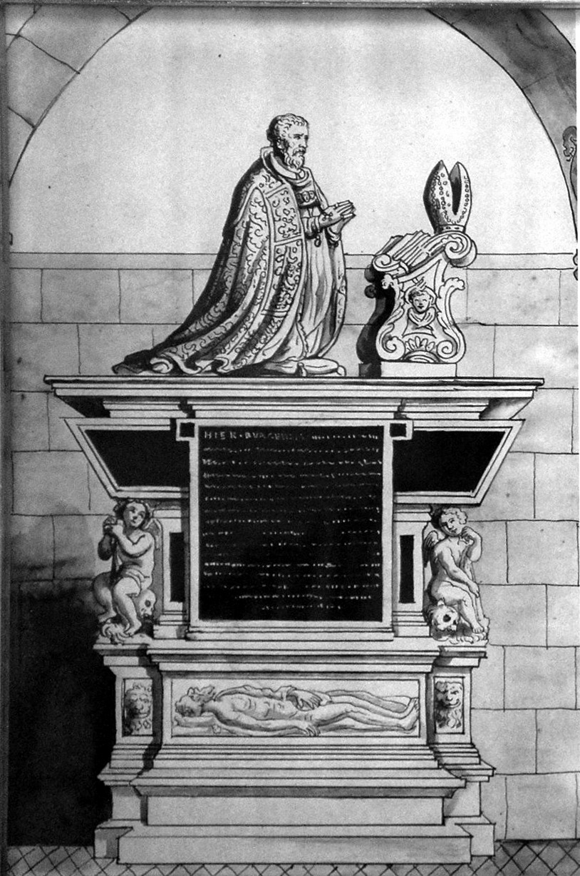 de la cathédrale.